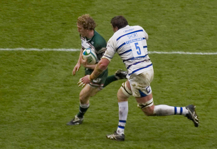 Sam Vesty, Peter Short, Bath Rugby v Leicester Tigers - 11 April 09 - Heineken Cup